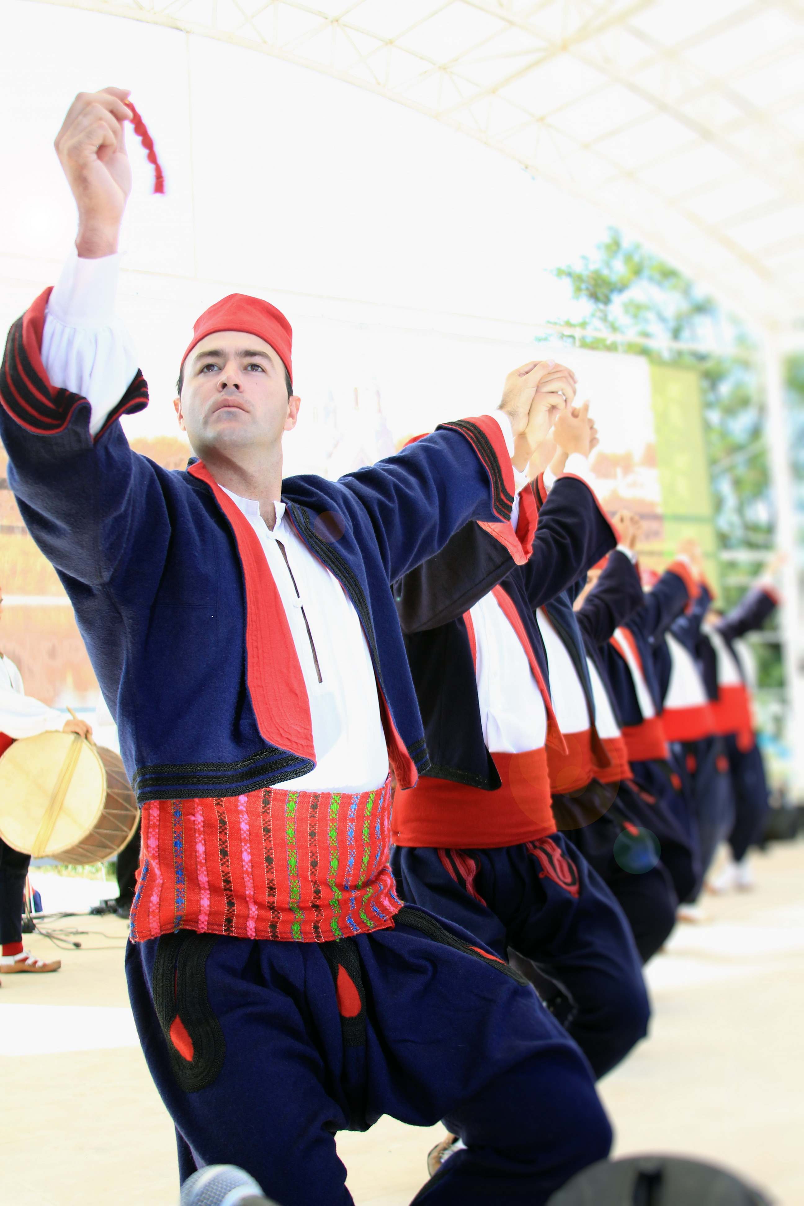 Serbian guys